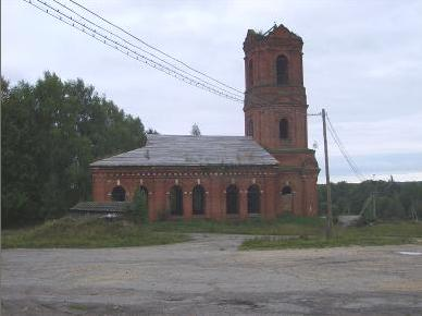 Троицкая церковь села Коровка